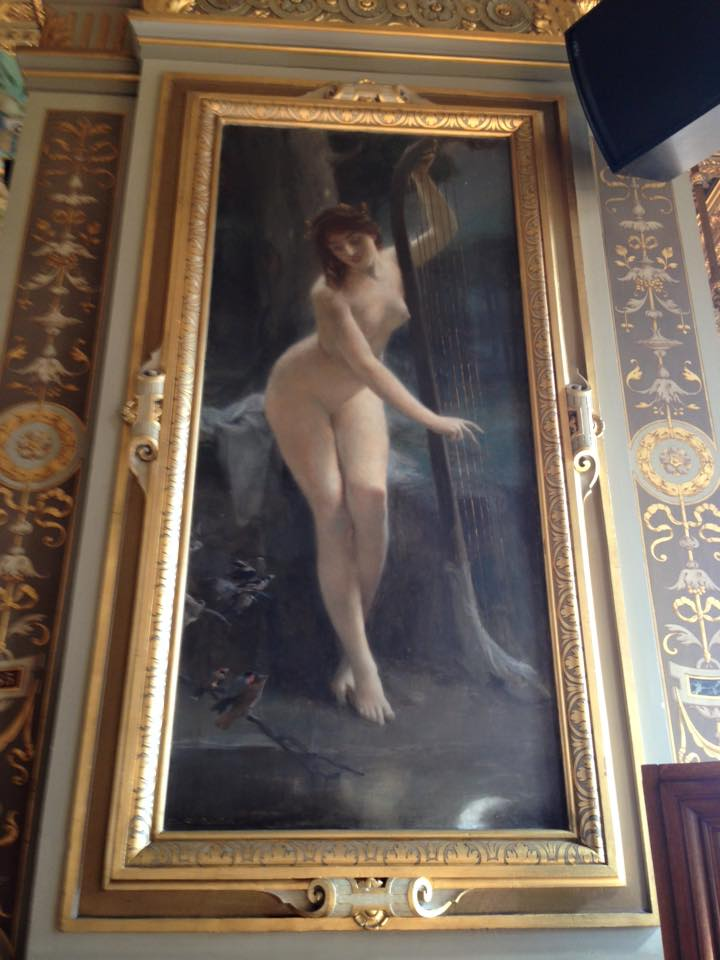 François Flameng, La Musique, Paris, Hôtel de Ville